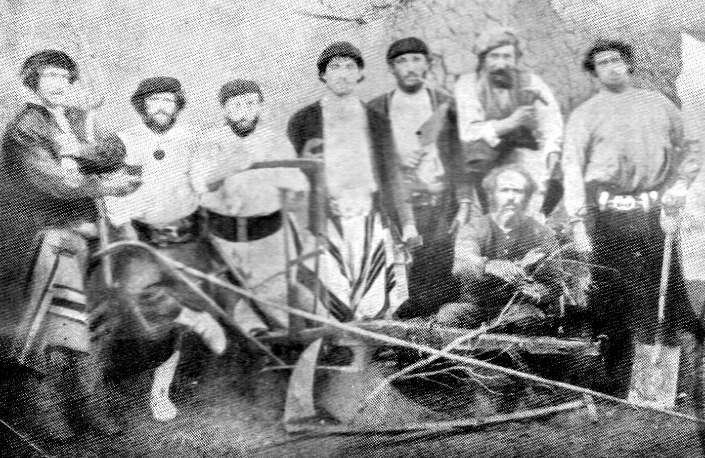 José de la Cuadra y los peones que amojonaron las manzanas, quintas y chacras del pueblo San José de Balcarce en 1876